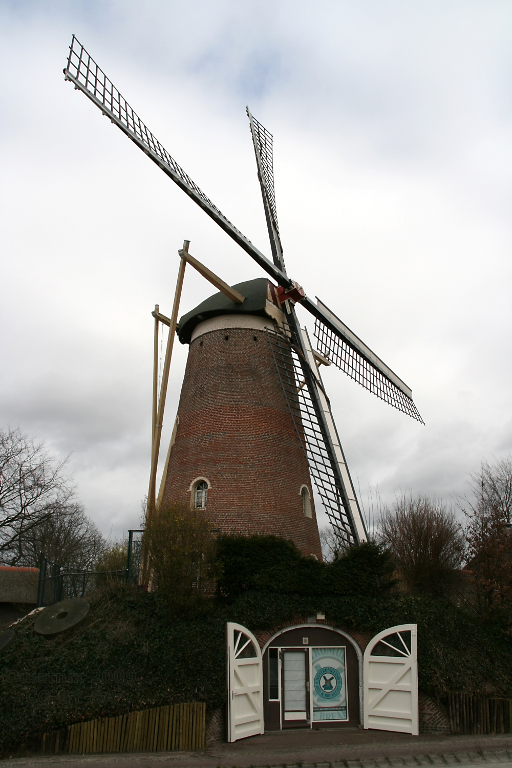 Acht: Molen Annemie, tegenwoordig B & B